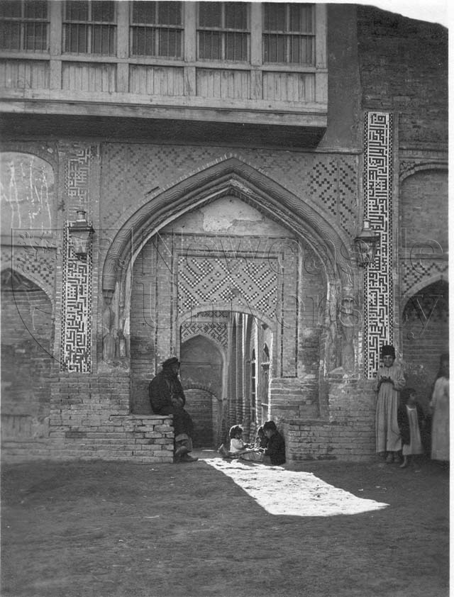 صورة قديمة لجامع سيد سلطان علي الواقع في جانب الرصافة من بغداد عام 1918، والصورة ماخوذة من ارشيف غرويتيد بيل عام 1918 وجامع سيد سلطان علي من مساجد بغداد القديمة والتراثية ويقع في شارع الرشيد